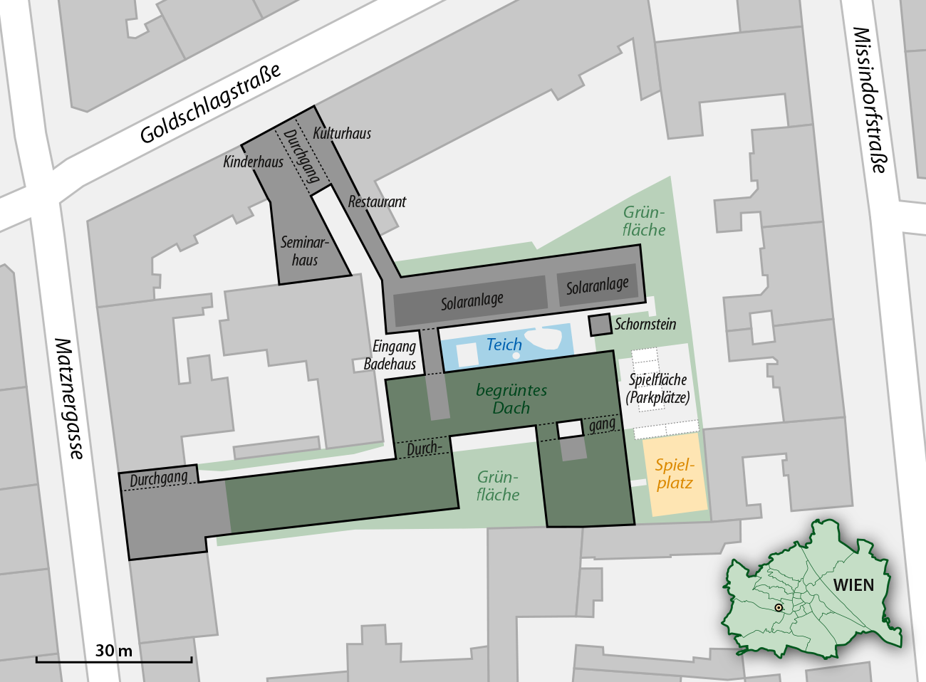 Plan der Sargfabrik in Wien-Penzing